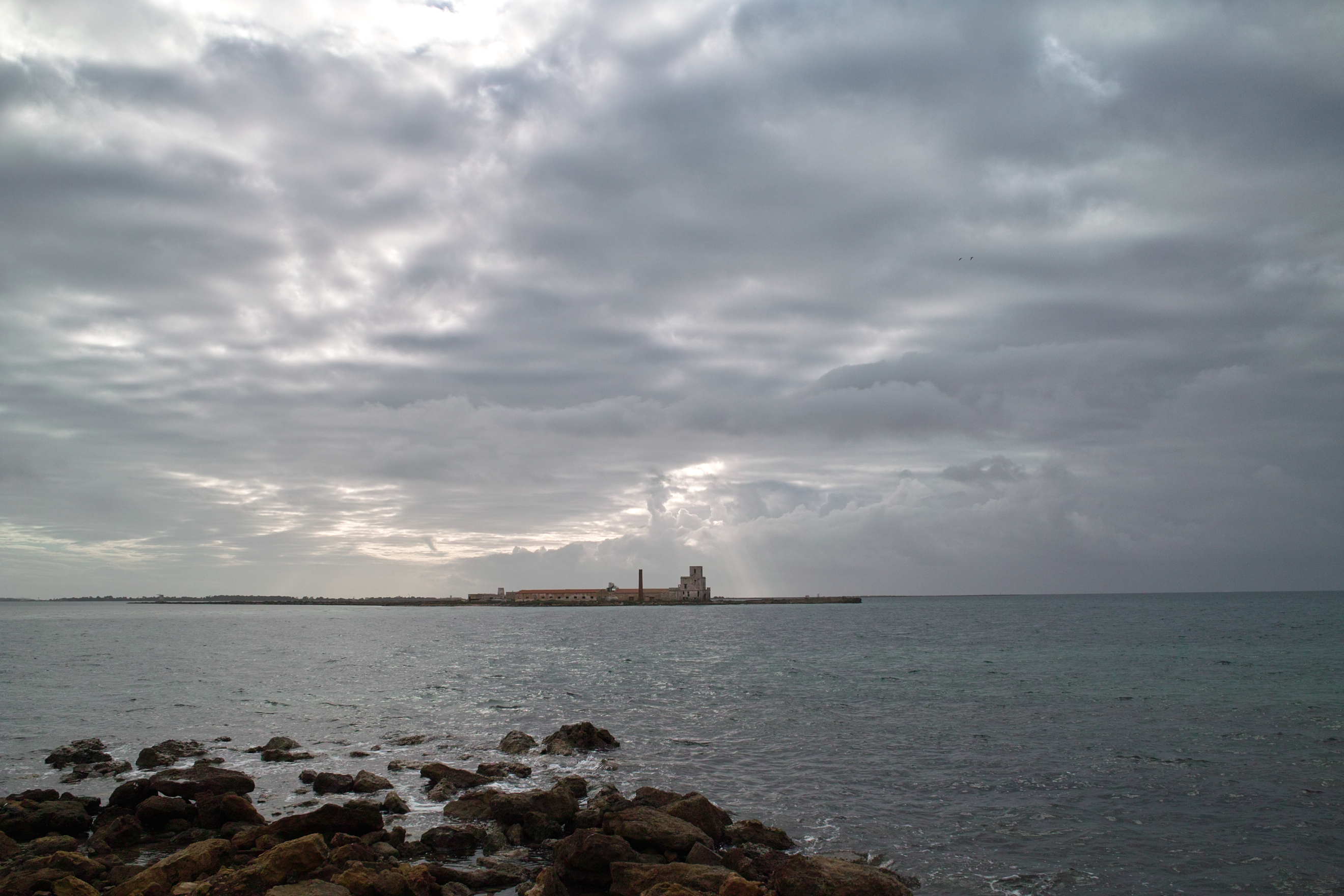 Isola Grande (Provincia di Trapani) Nordspitze der Insel vom Festland aus gesehen